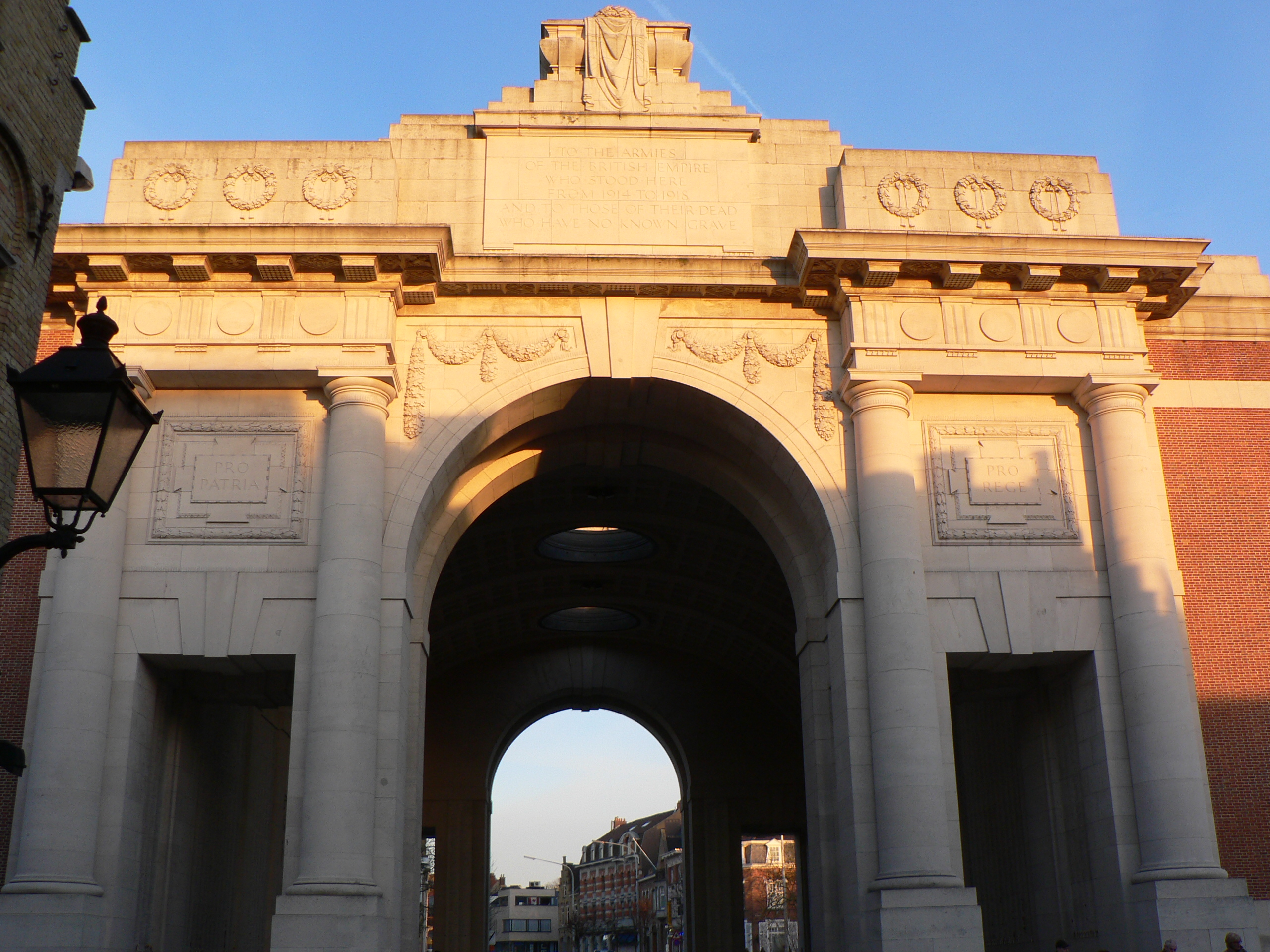 Menin Gate, Ypres, Belgium